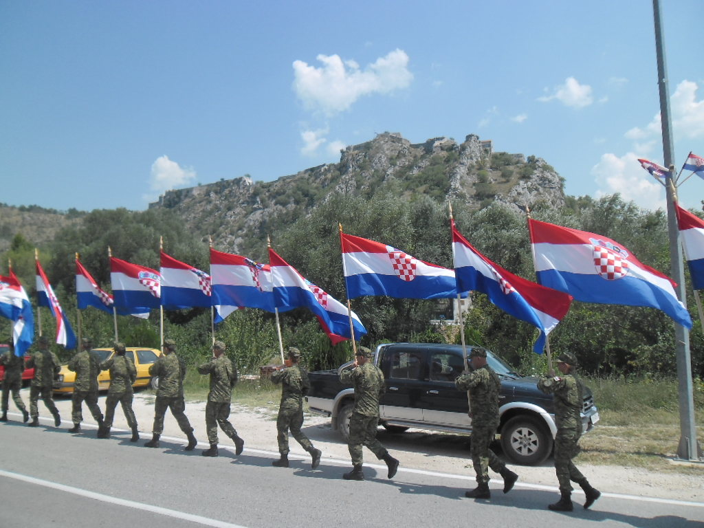 proslava Dana pobjede i domovinske zahvalnosti (20. obljetnice vojno-redarstvene operacije Oluje) u Kninu 5. kolovoza 2015.